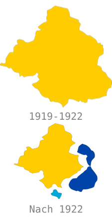 Teilung Oberschlesiens 1922 (Gelb - Provinz Oberschlesien/Deutschland, Blau - Autonome Woiwodschaft Schlesien/Polen, Hellblau - Hultschiner Ländchen/Tschechoslowakei)